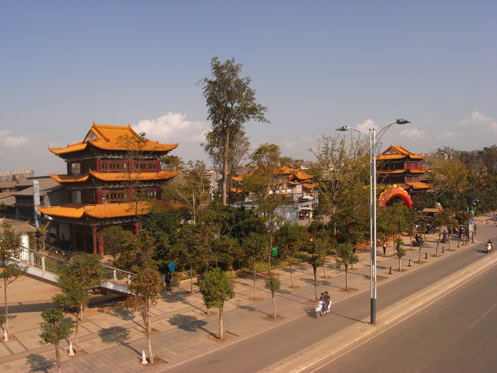 官渡古鎮